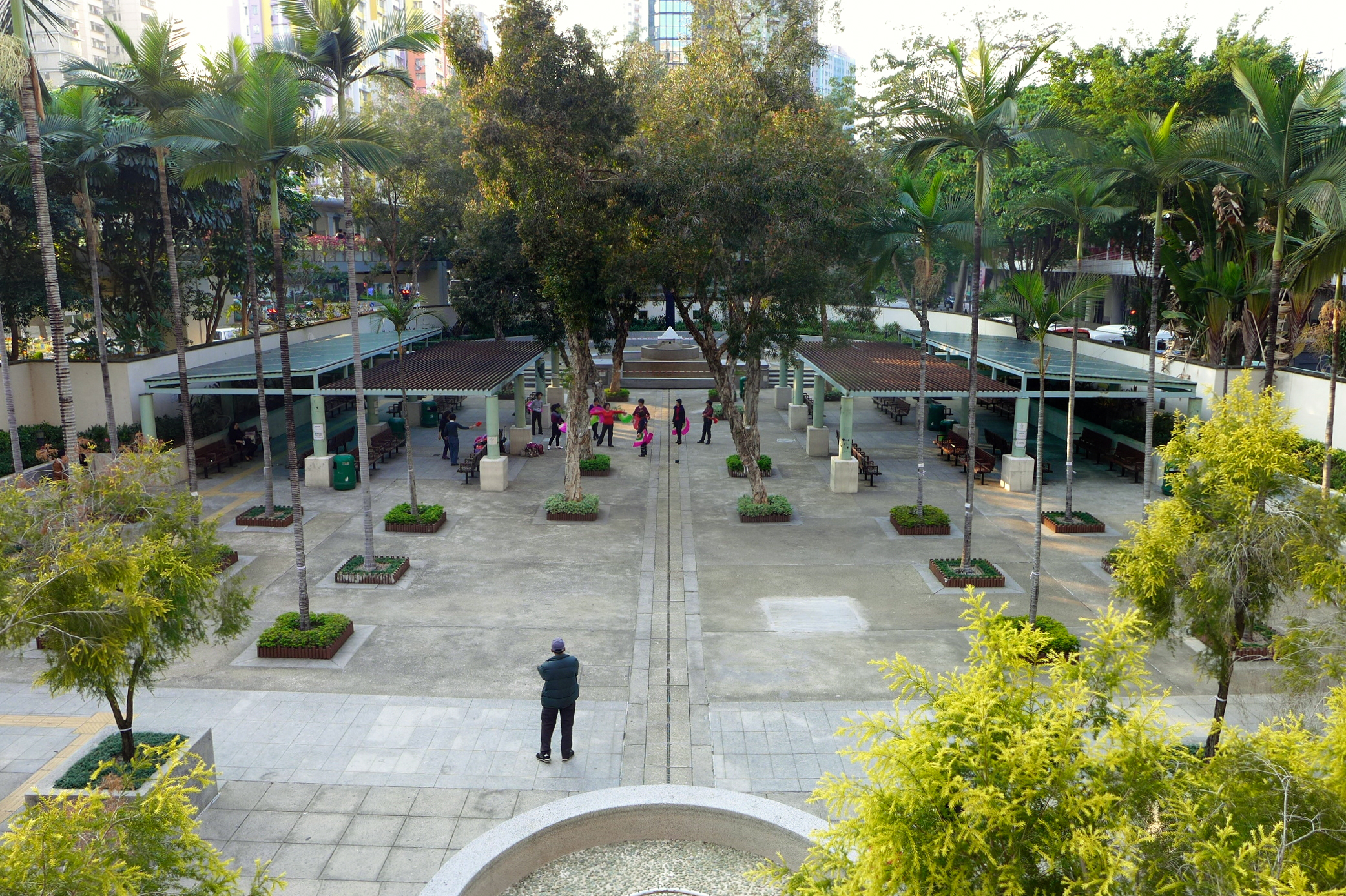 Sai Lau Kok Garden before redevelopment